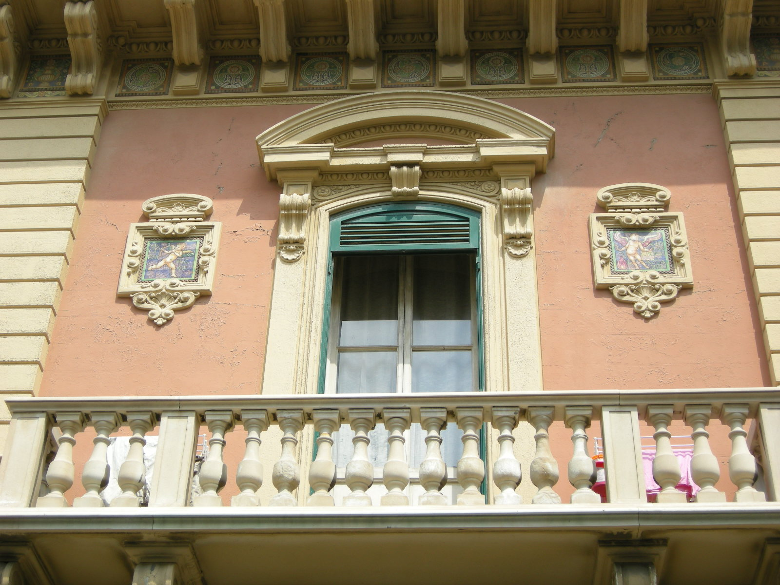 Villino Brunetti, dettaglio